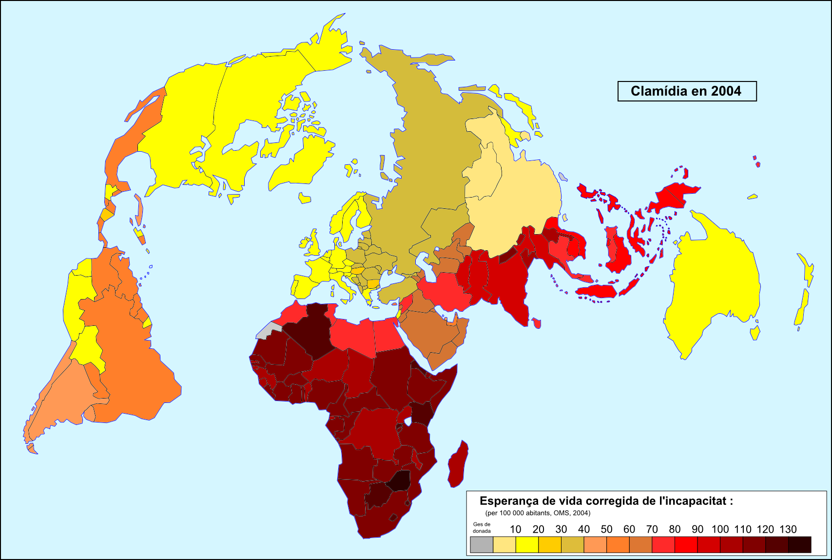 Esperança de vida corregida de l'incapacitat per la clamídia en 2004.